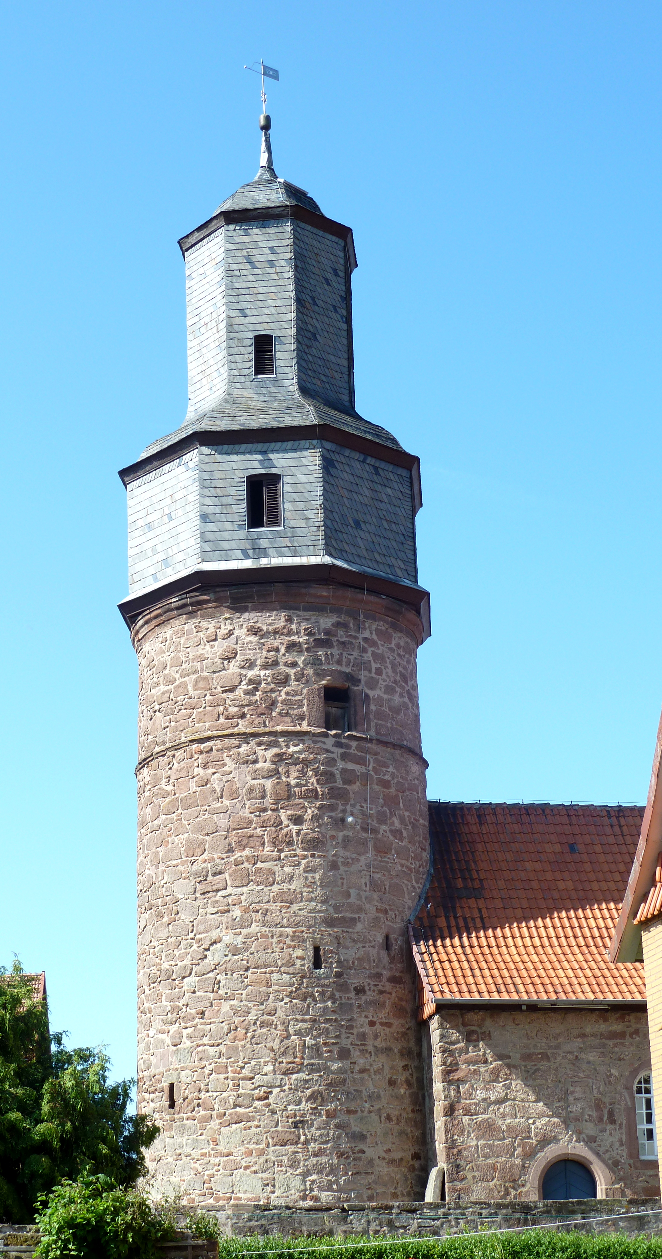 Turm und Ansatz des Kirchenschiffs der Evangelisch-reformierten Kirche in Sattenhausen, Gemeinde Gleichen, Landkreis Göttingen. Rundturm mittelalterlich, Schiff im 17. Jahrhundert angebaut. Im Südwesten der Kirche ist ein Teil der Wehrmauer erhalten. Blick von Süden (die heutige Krone der Wehrmauer ist auf dem Bild unten noch erkennbar).